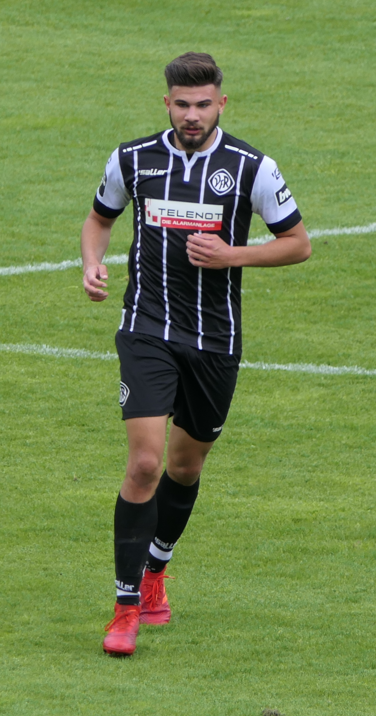 Der Fussballprofi Antonios Papadopoulos im Trikot des VfR Aalen beim Heimspiel gegen Eintracht Braunschweig am 05.05.2019.